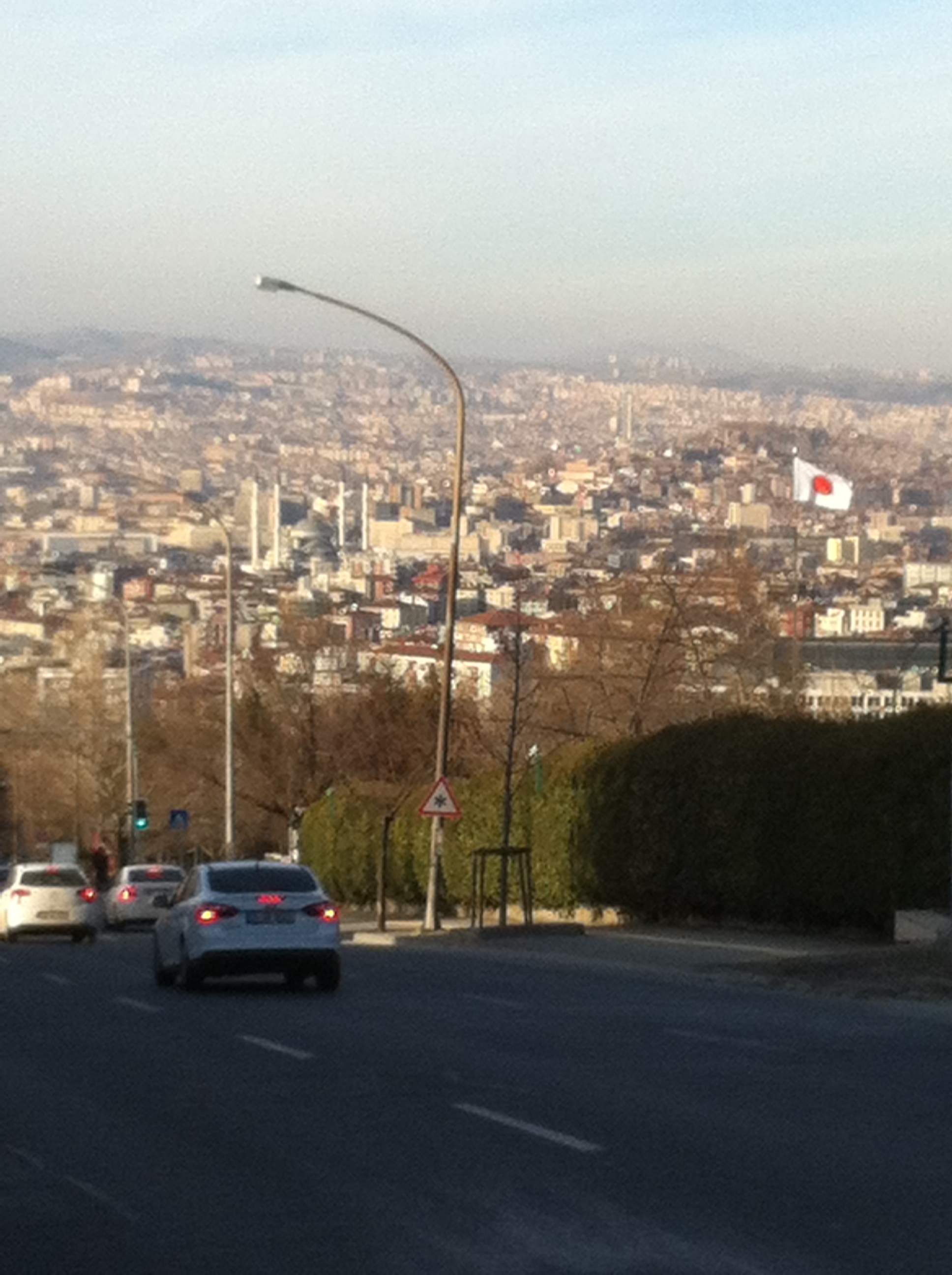 Ankara, Turkey